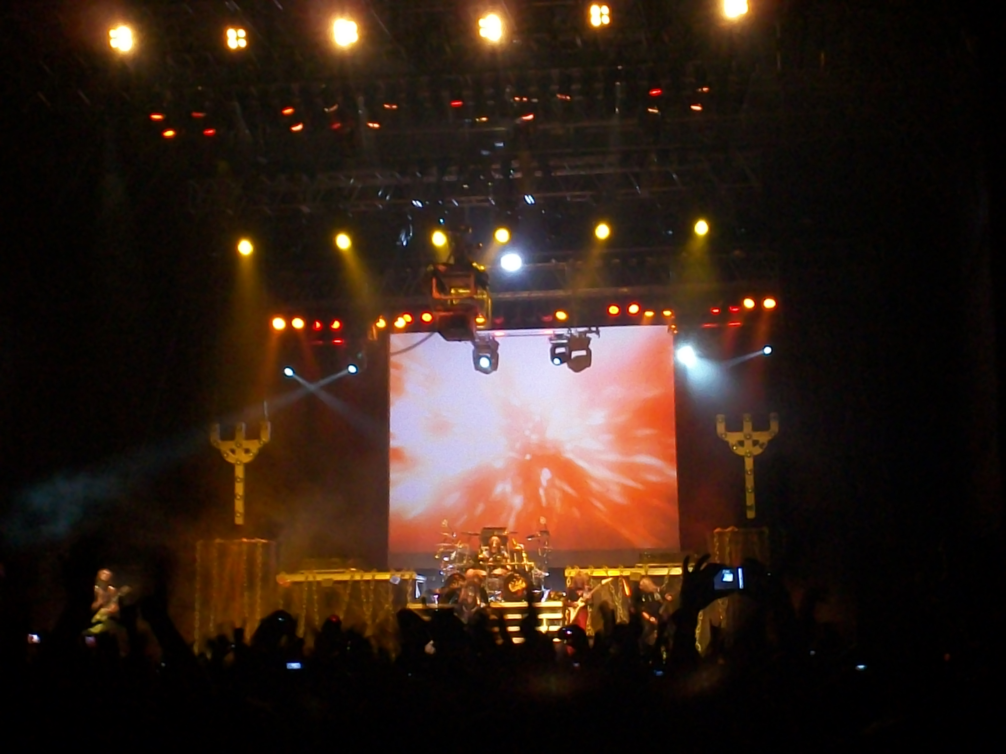 Judas Priest 27 septiembre 2011 antes mas de 15.000 personas.